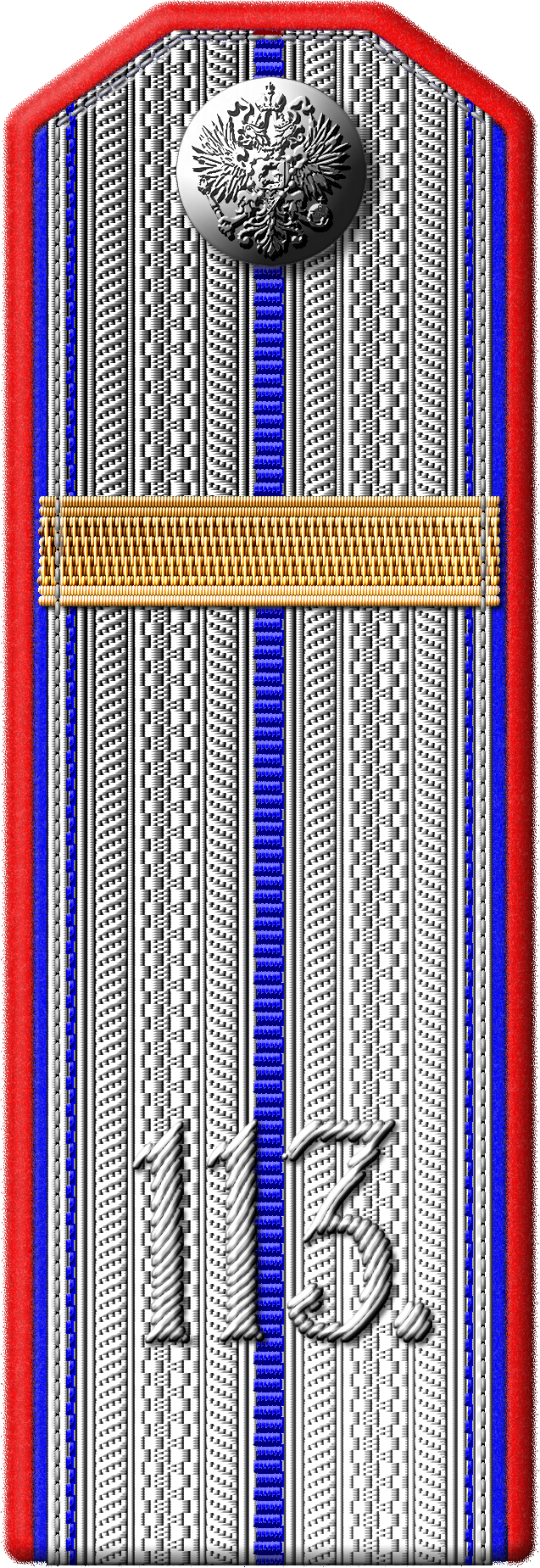 Российская Империя. Российская Императорская армия Род войск/службы: Военно-медицинское ведомство Знаки различия: погоны образца 1914г. Чин/звание: Зауряд-врач, служащий в 113-м пехотном Старорусском полку. Первичные источники: Полное собрание законов Российской Империи, Собрание 2, № 47853 от 31 декабря 1869г. Полное собрание законов Российской империи собр. 3, № 10832 от 19 июня 1894г. Приказ по военному ведомству №120 от 12 марта 1908г. Приказ по Военному ведомству №116 от 17 марта 1914г. Вторичный источник: Сологуб Кирилл (текст), Васильев Кирилл (рисунки) Погоны зауряд-военных чиновников Российской императорской армии (ответы на вопросы и вопросы без ответов) (рус.) // Петербургский коллекционер: журнал. — СПб., 2012. — № 2 (70). — С. 80-85. — (рис.10, исправлен автором)